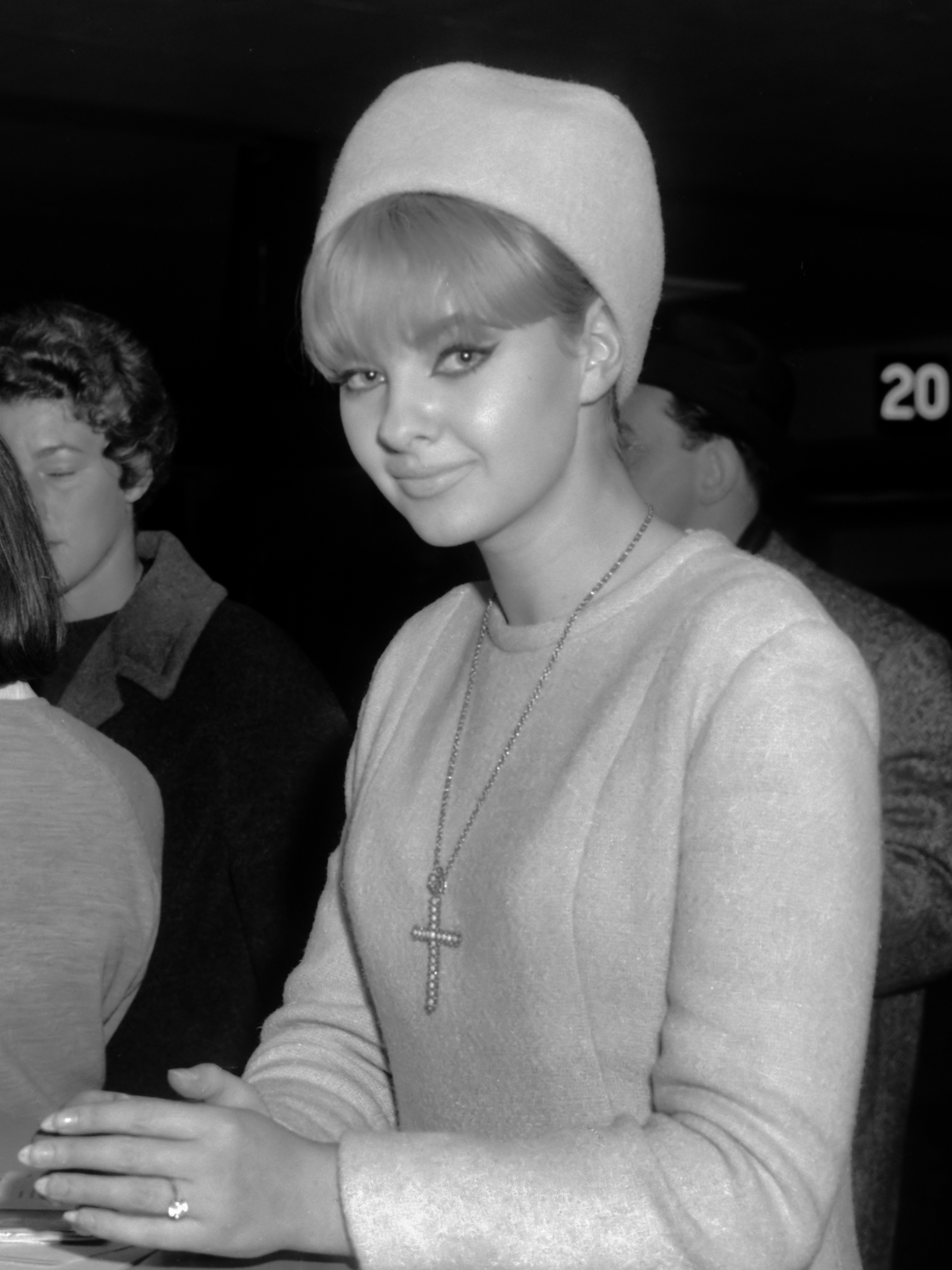 Mandy Rice Davies op Schiphol 30 november 1964